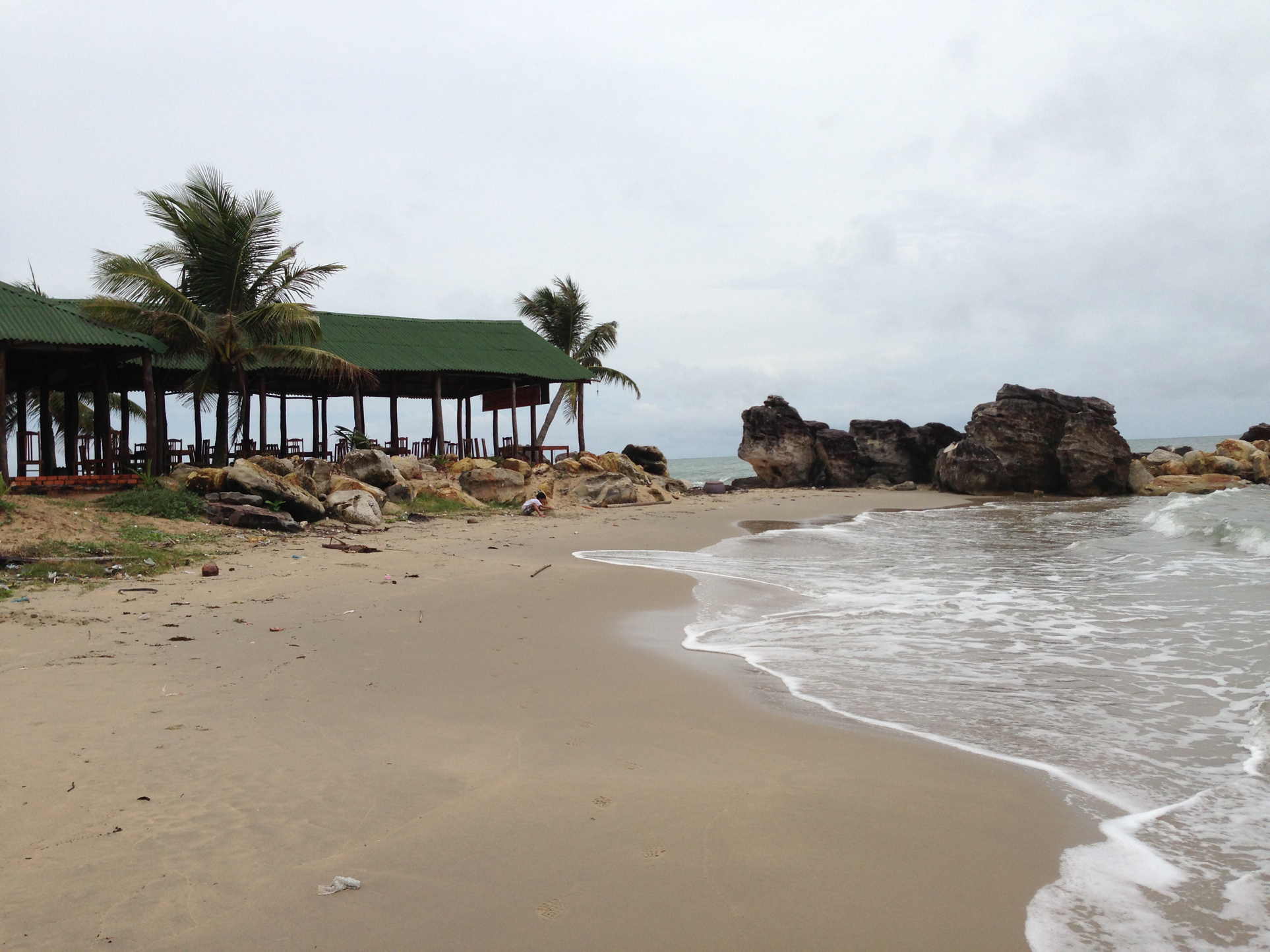 Biển Phú quốc, Dương Tơ, Vietnam